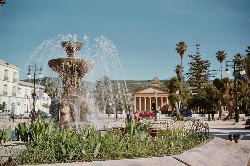 La fontaine et parque, Cherchell.